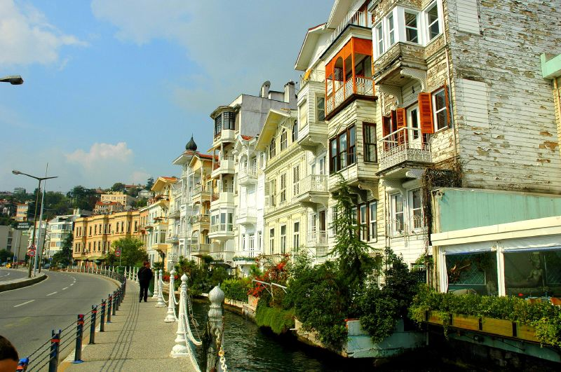 arnavutkoy bus stop